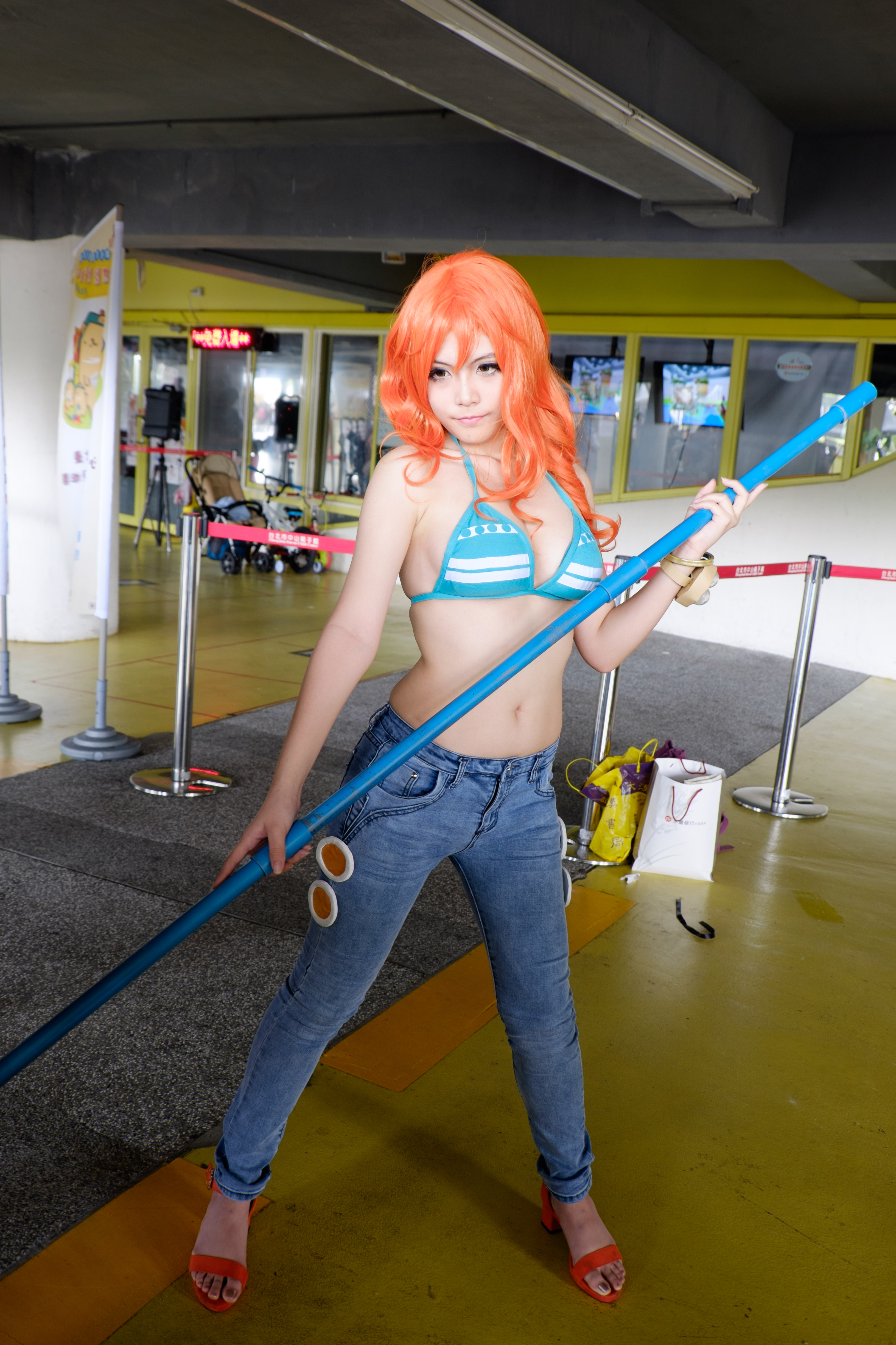 第22屆亞洲動漫創作展，《One Piece》娜美cosplayer。